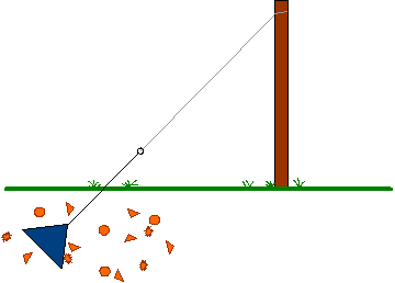 Et jordanker er et hjelpemiddel som skal skape ett stabilt feste i bakken, når det ikke er praktisk mulig å få feste i fjell.